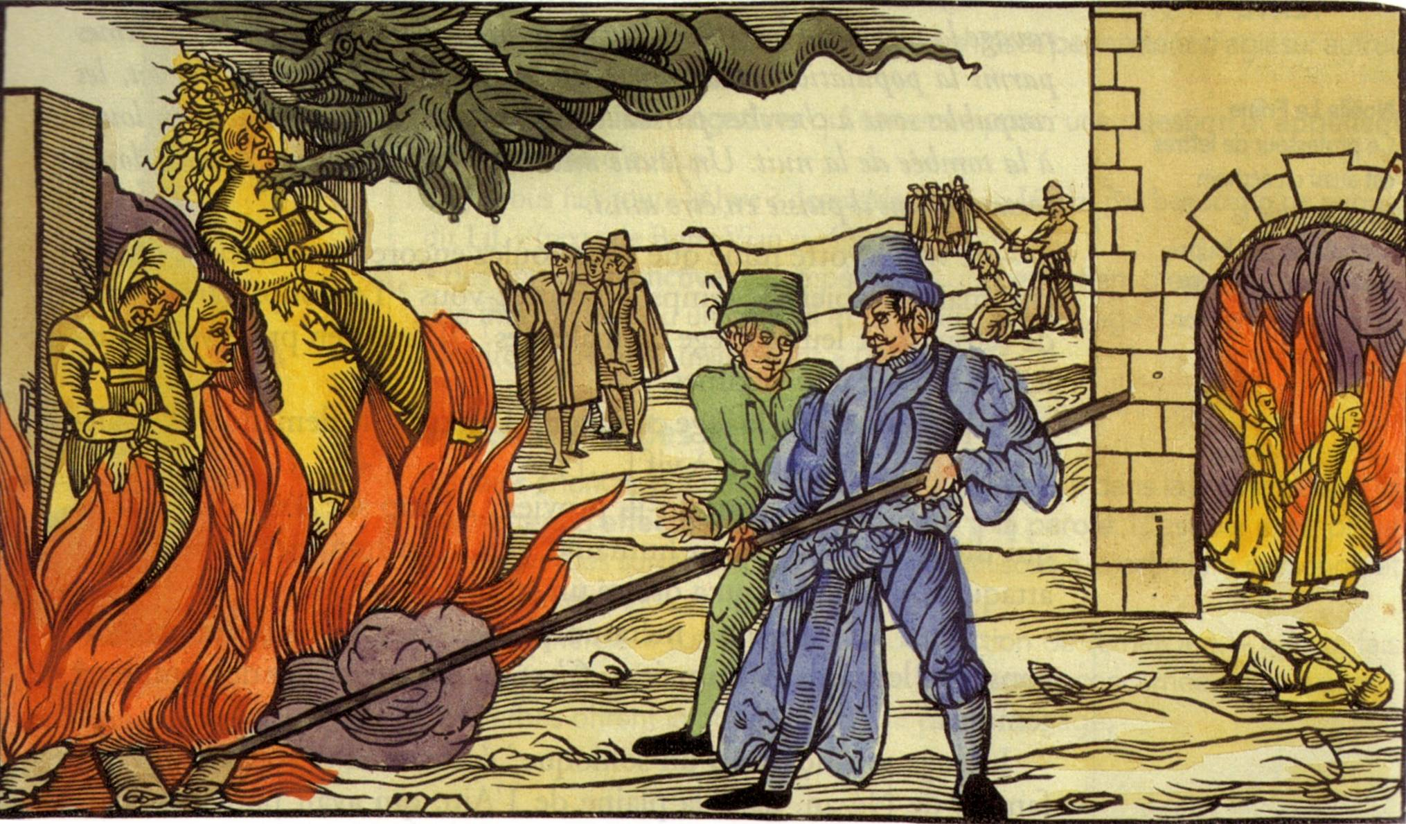 Gravure médiévale